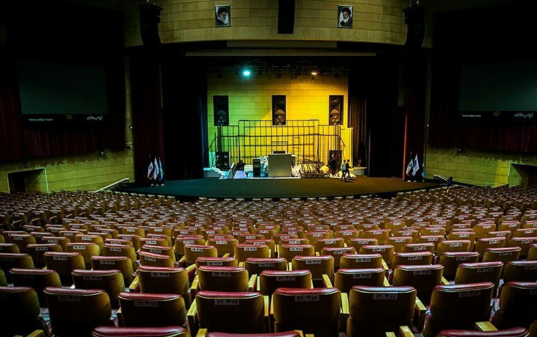 سالن اصلی مرکز همایش‌های برج میلاد - ۱۳۹۵